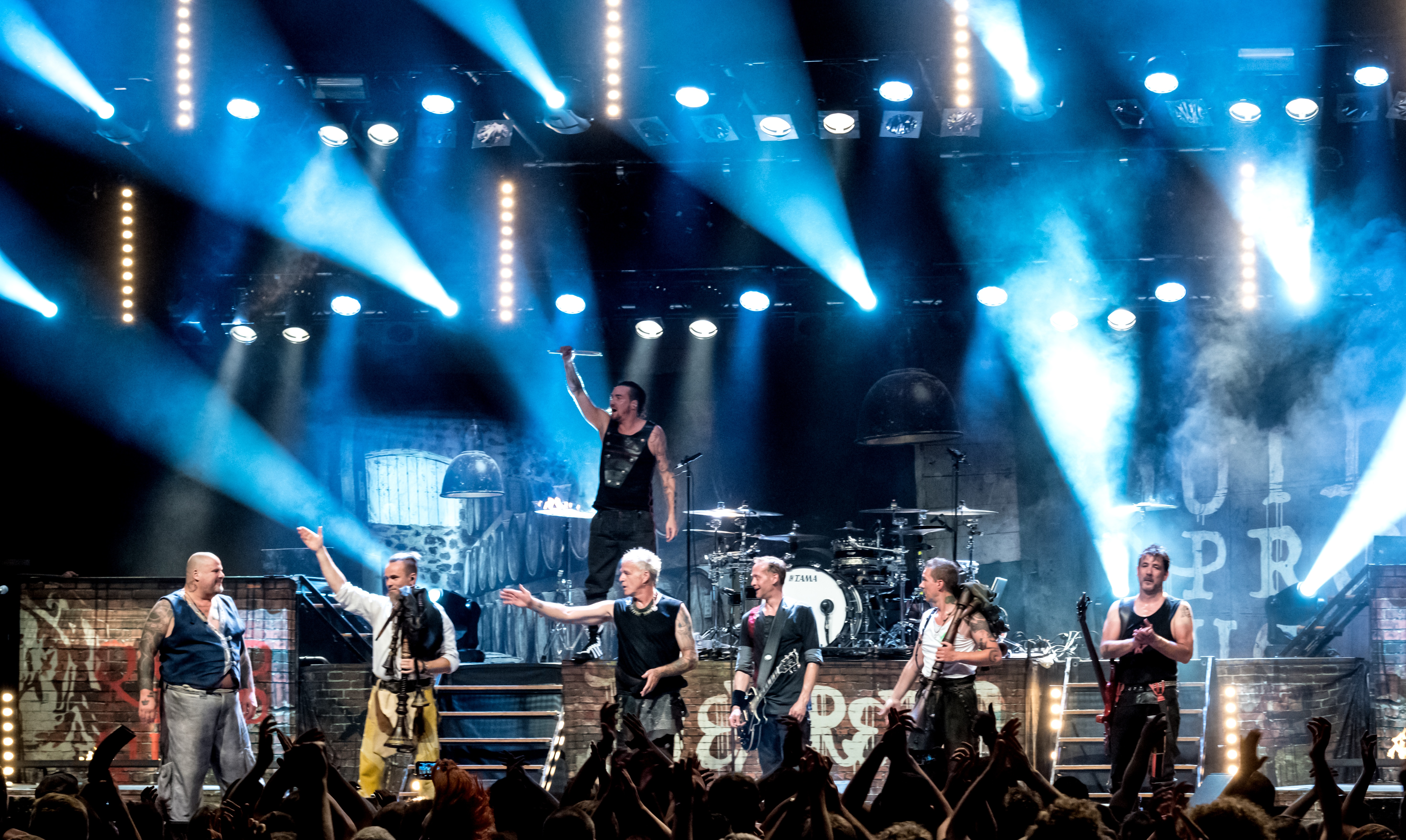 Bilder vom Zelt Musik Festival 2018 in Freiburg im Breisgau In Extremo am 29.07.2018 im Zirkuszelt